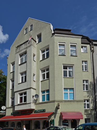 Stolpersteine Dortmund